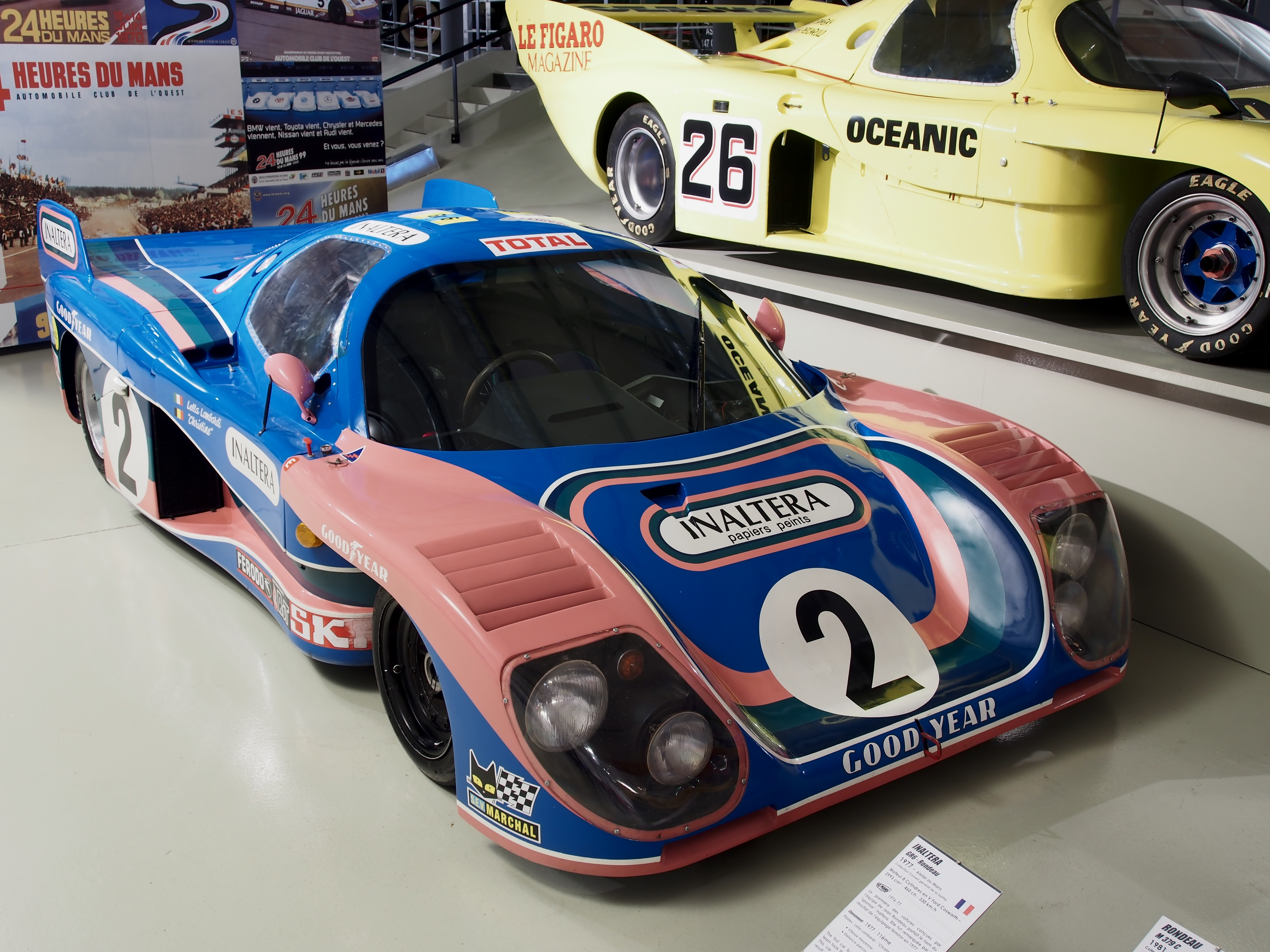 Photographed at Musée des 24 Heures du Mans, France.